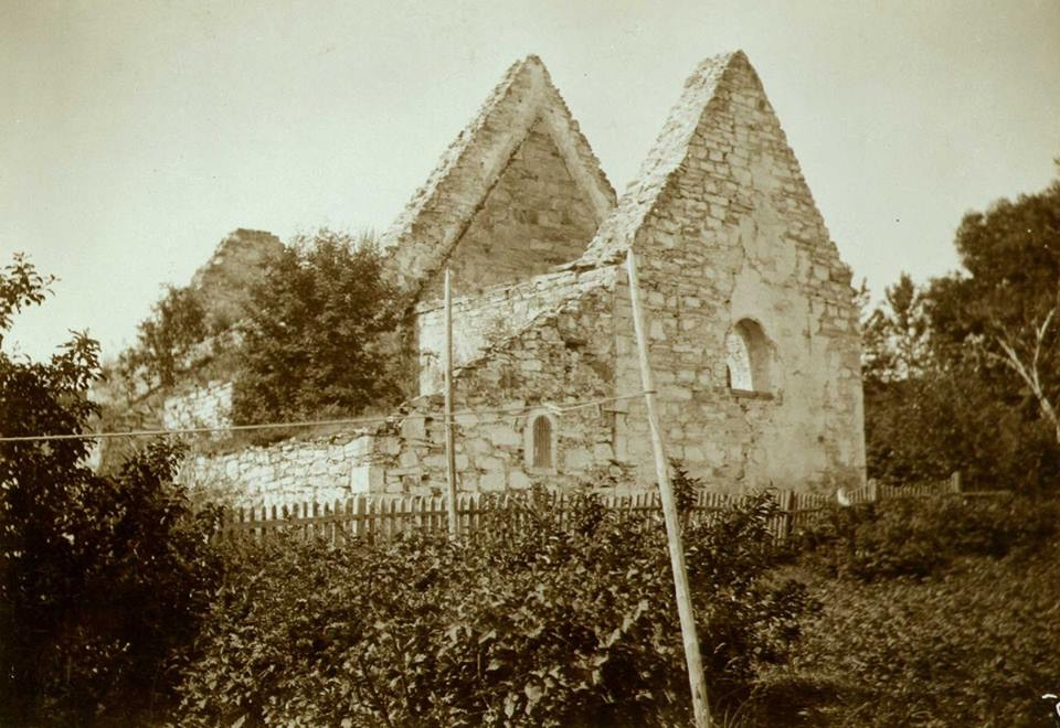 Old Sakshaug Church as a ruin between 1873 and 1908